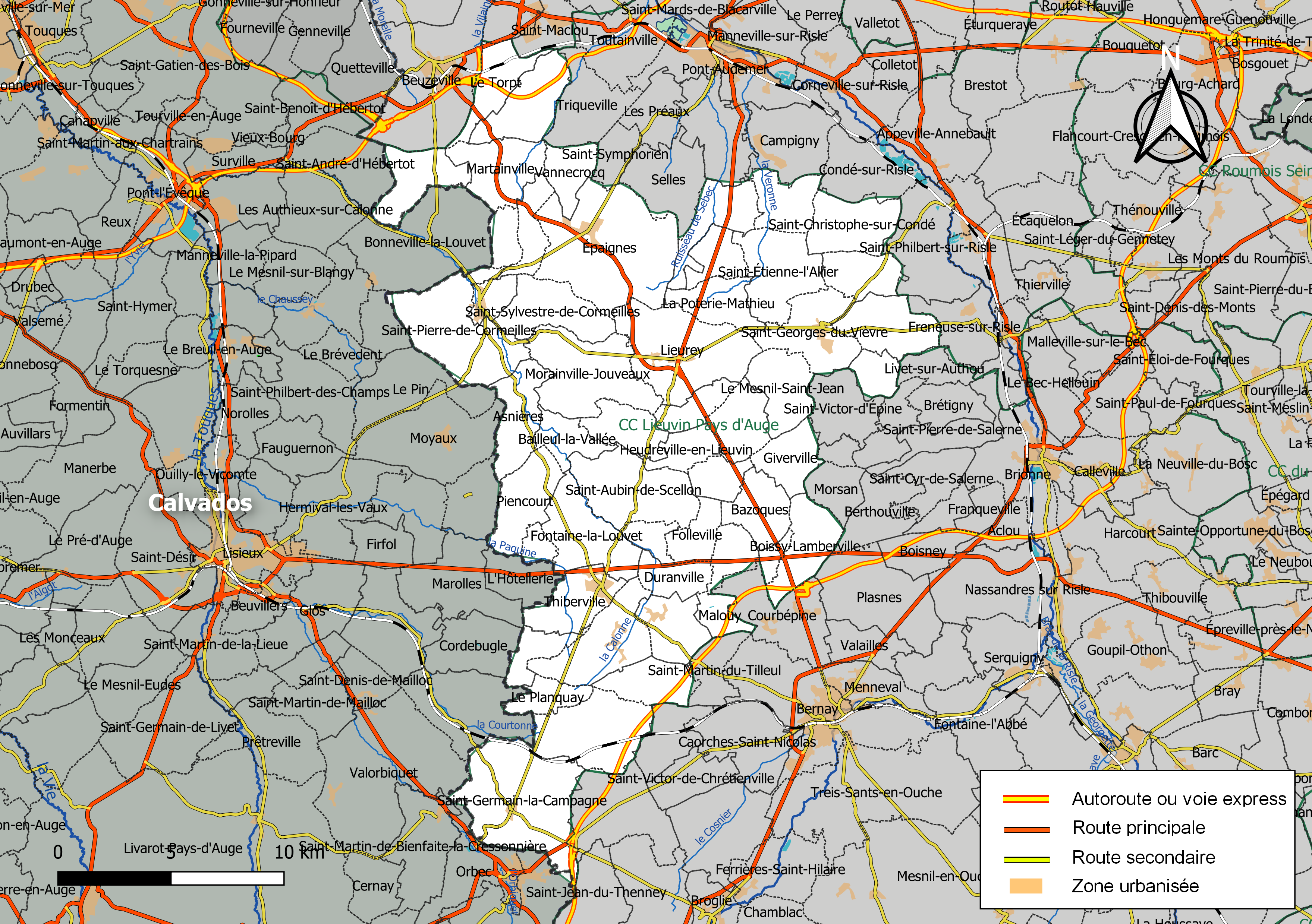 Carte géographique de la Communauté de communes Lieuvin Pays d'Auge, département de l'Eure, France. Composition au 1er janvier 2019.